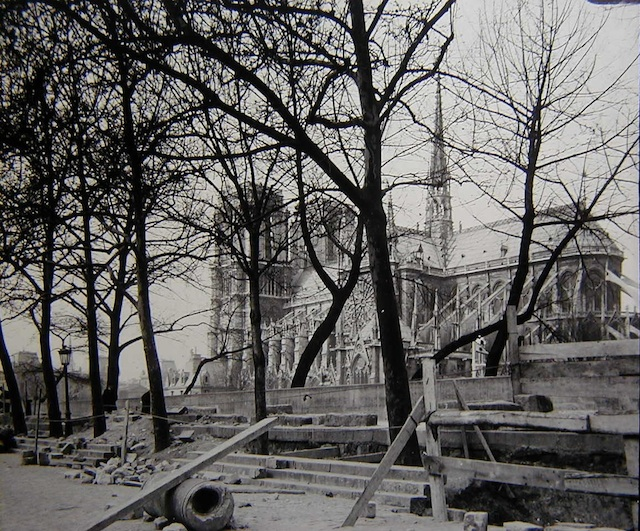 Notre Dame de Paris au début du XXème siecle